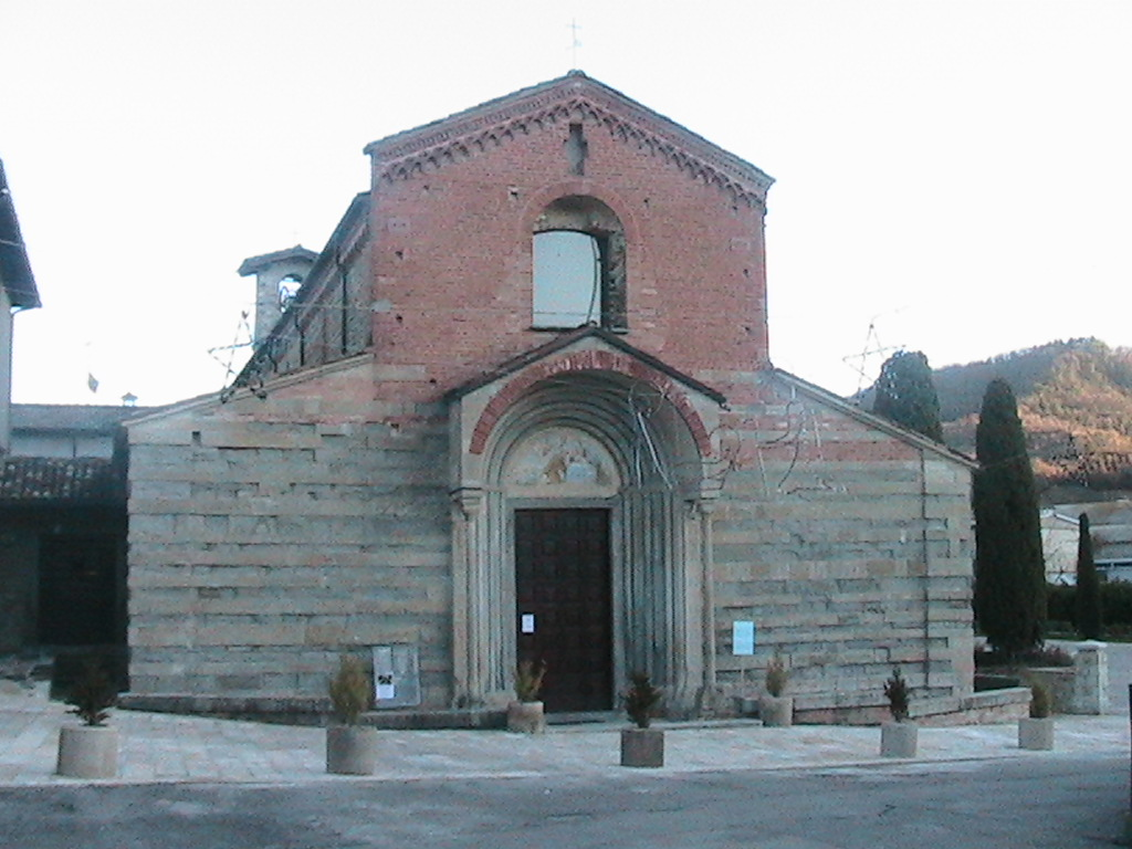 Varzi - Chiesa dei Cappuccini - facciata